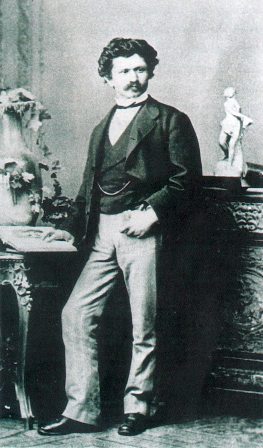 Constantin I. Stăncescu fotografie de Engels, București - colecția lui Adrian-Silvan Ionescu